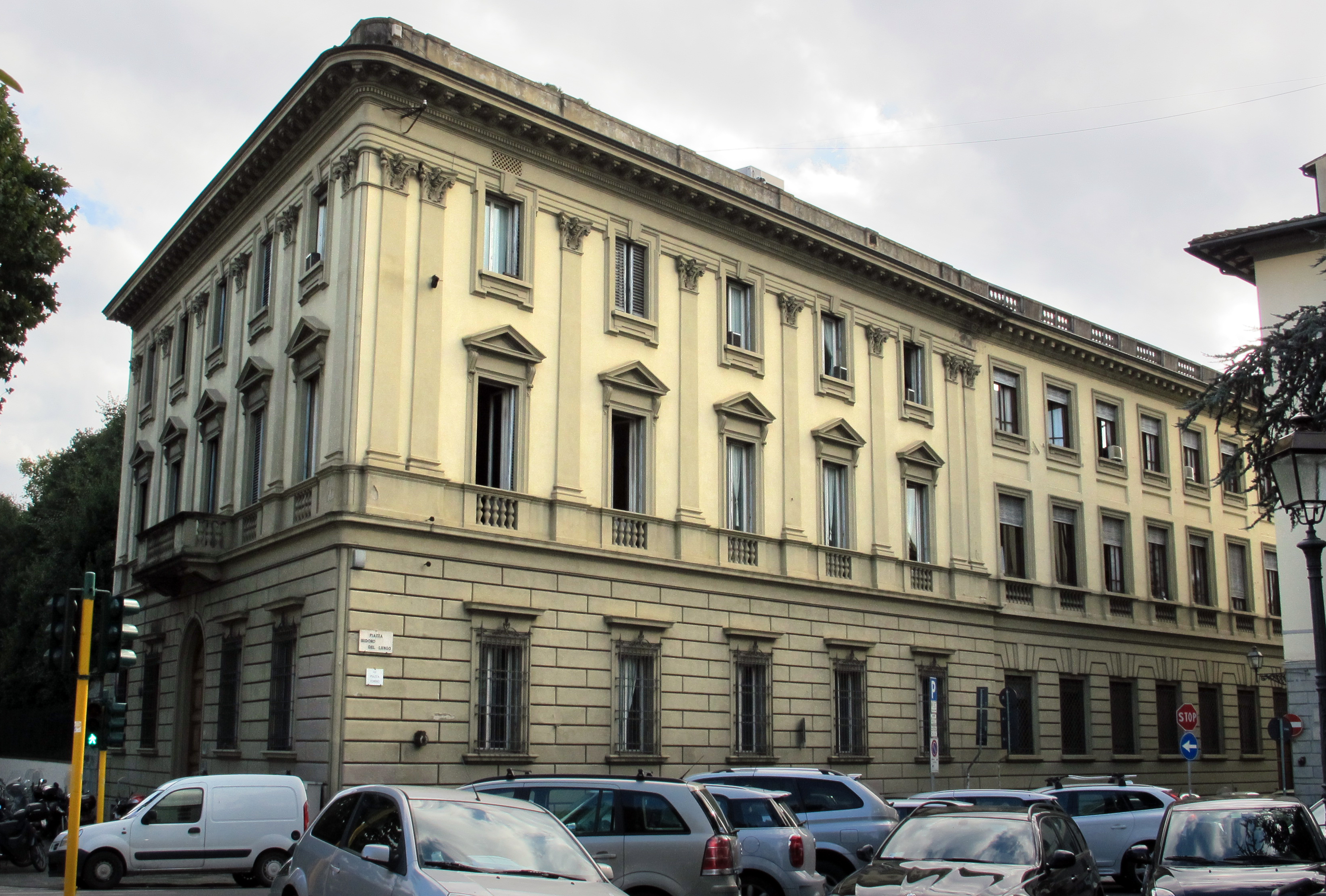 Firenze